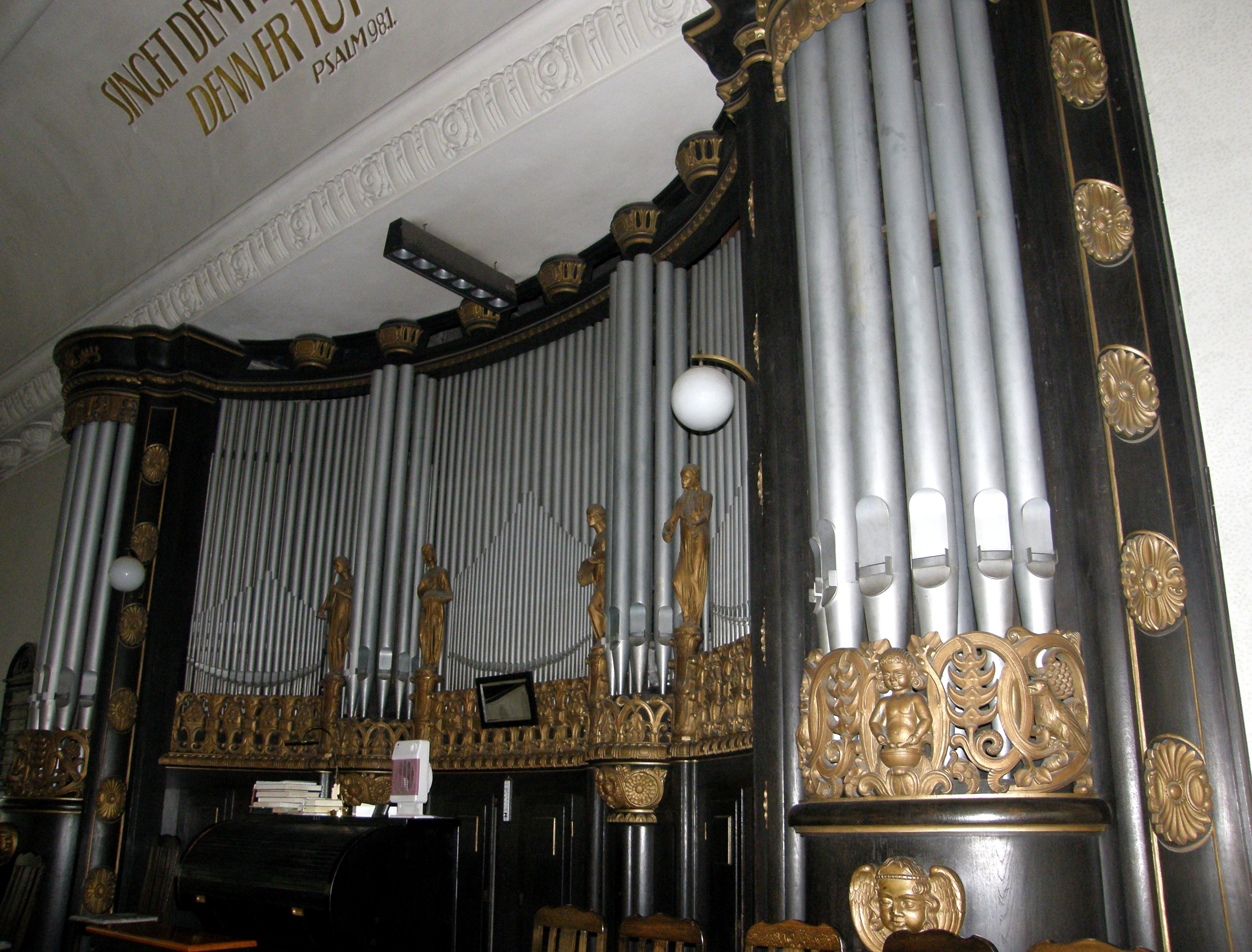 Friedenskirche in Aue-Zelle